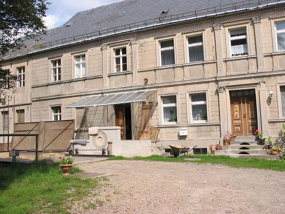 Obermühle am Pfefferfließ, Brandenburg